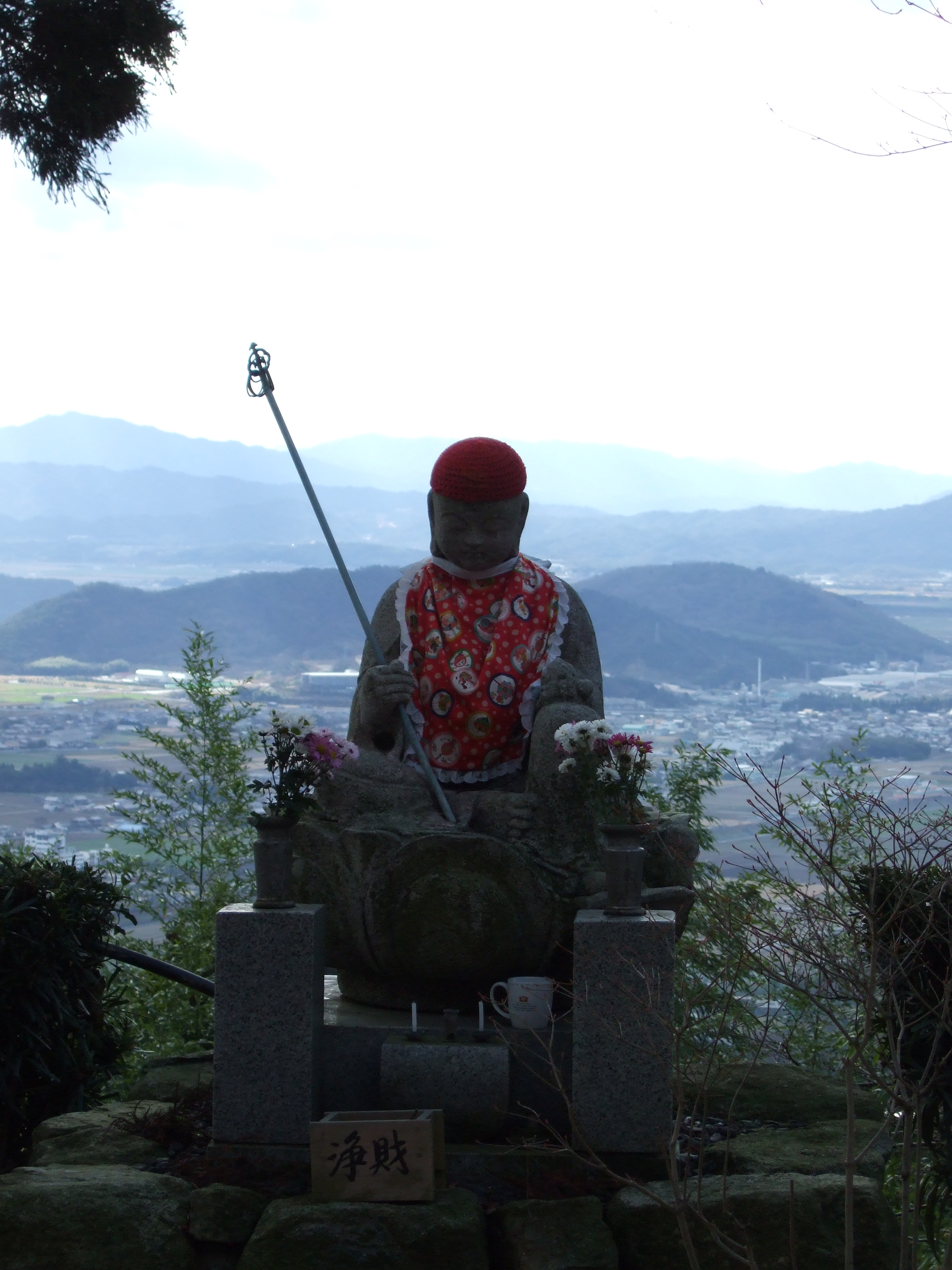 観音正寺